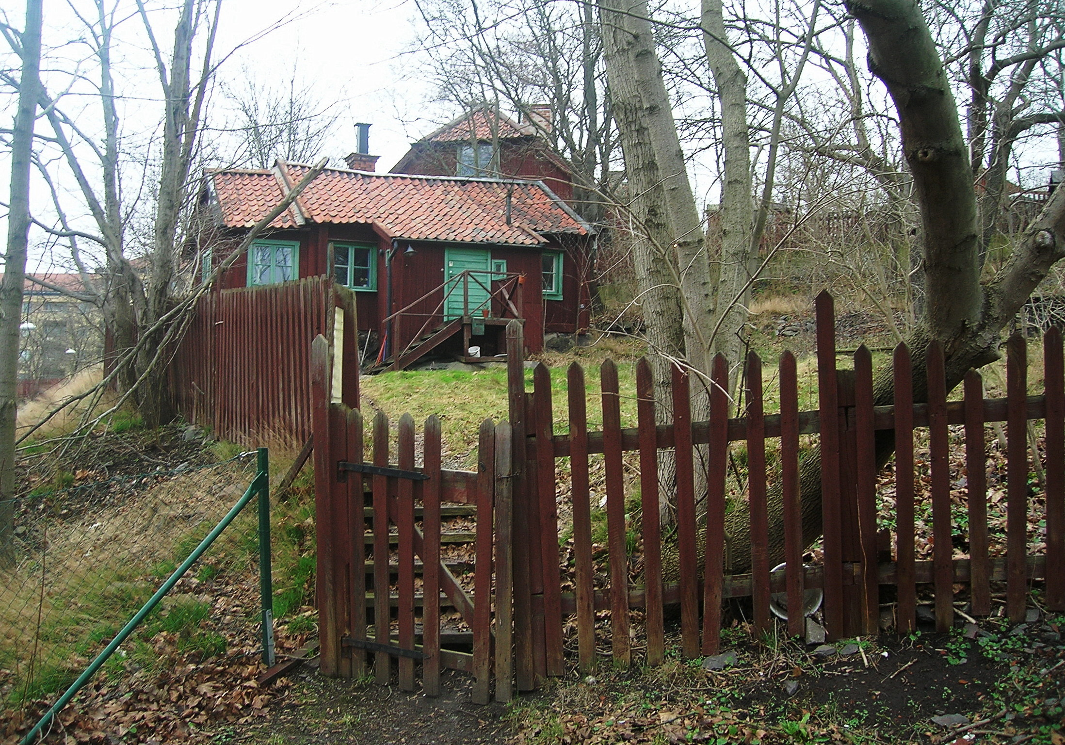 Hasse och Tages skrivstuga i Vita Bergen, kontor för Svenska Ord